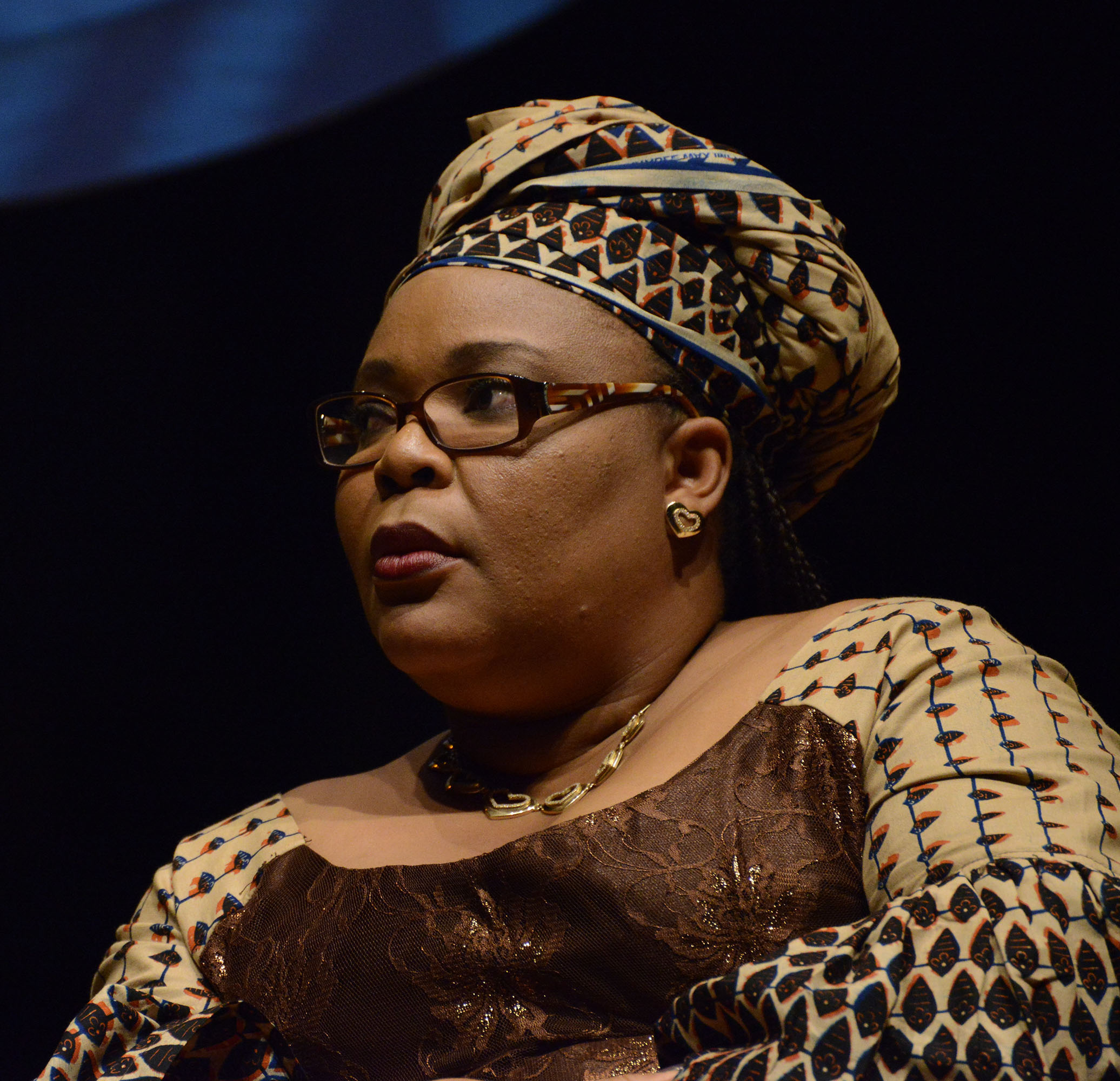 Leymah Gbowee no Fronteiras do Pensamento Porto Alegre 2013